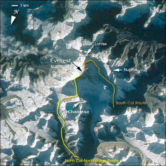 Everest, view from Satellite with climbing routes, add Changtse